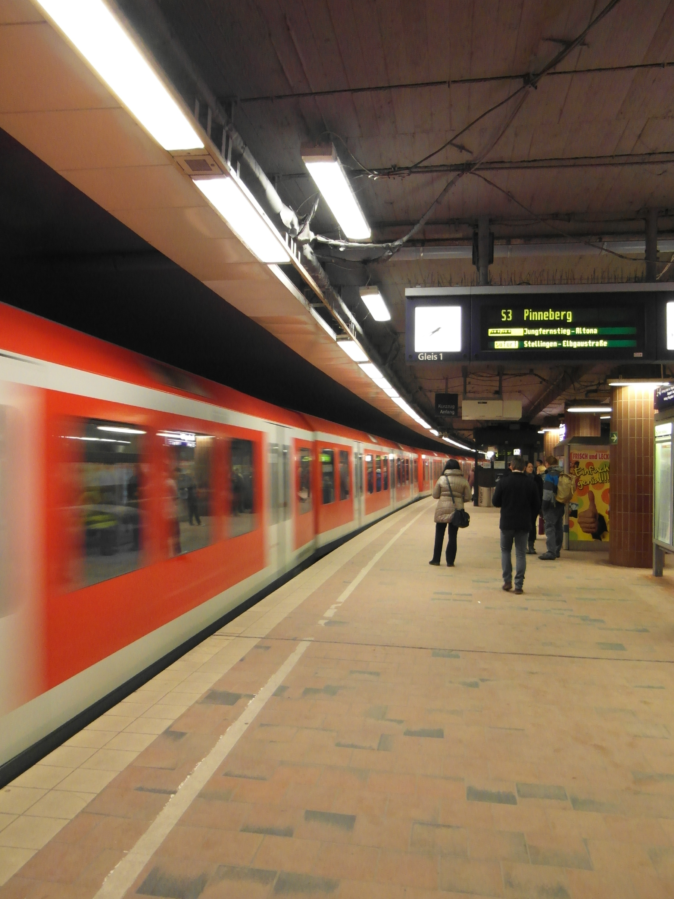 Tunnelbahnsteig der S-Bahn